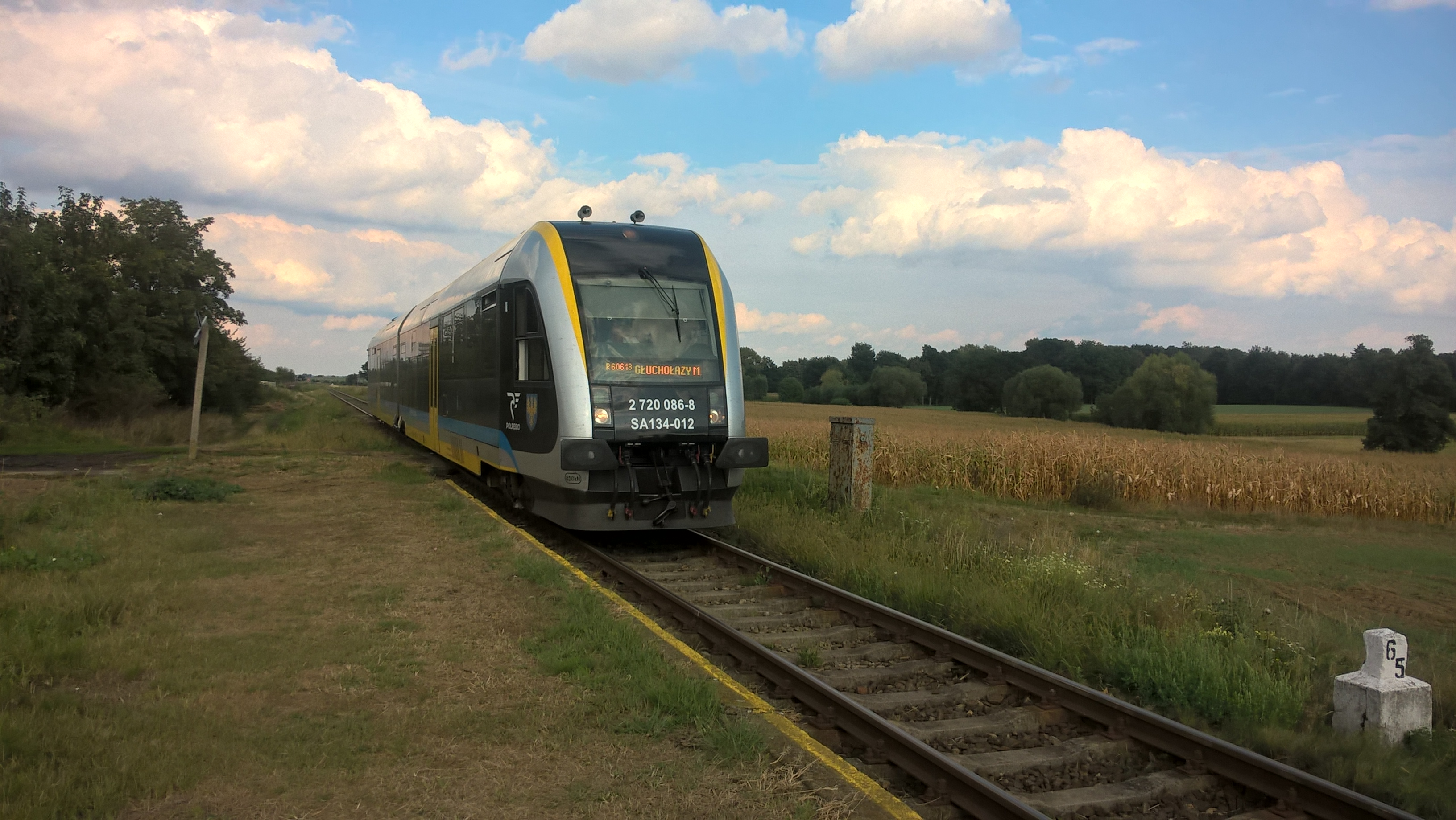 Pociąg spółki POLREGIO na przystanku Myśliczyn (woj. opolskie).